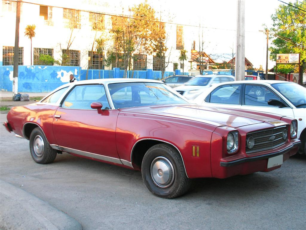 1973 Chevrolet Chevelle Laguna Colonnade Hardtop Coupe